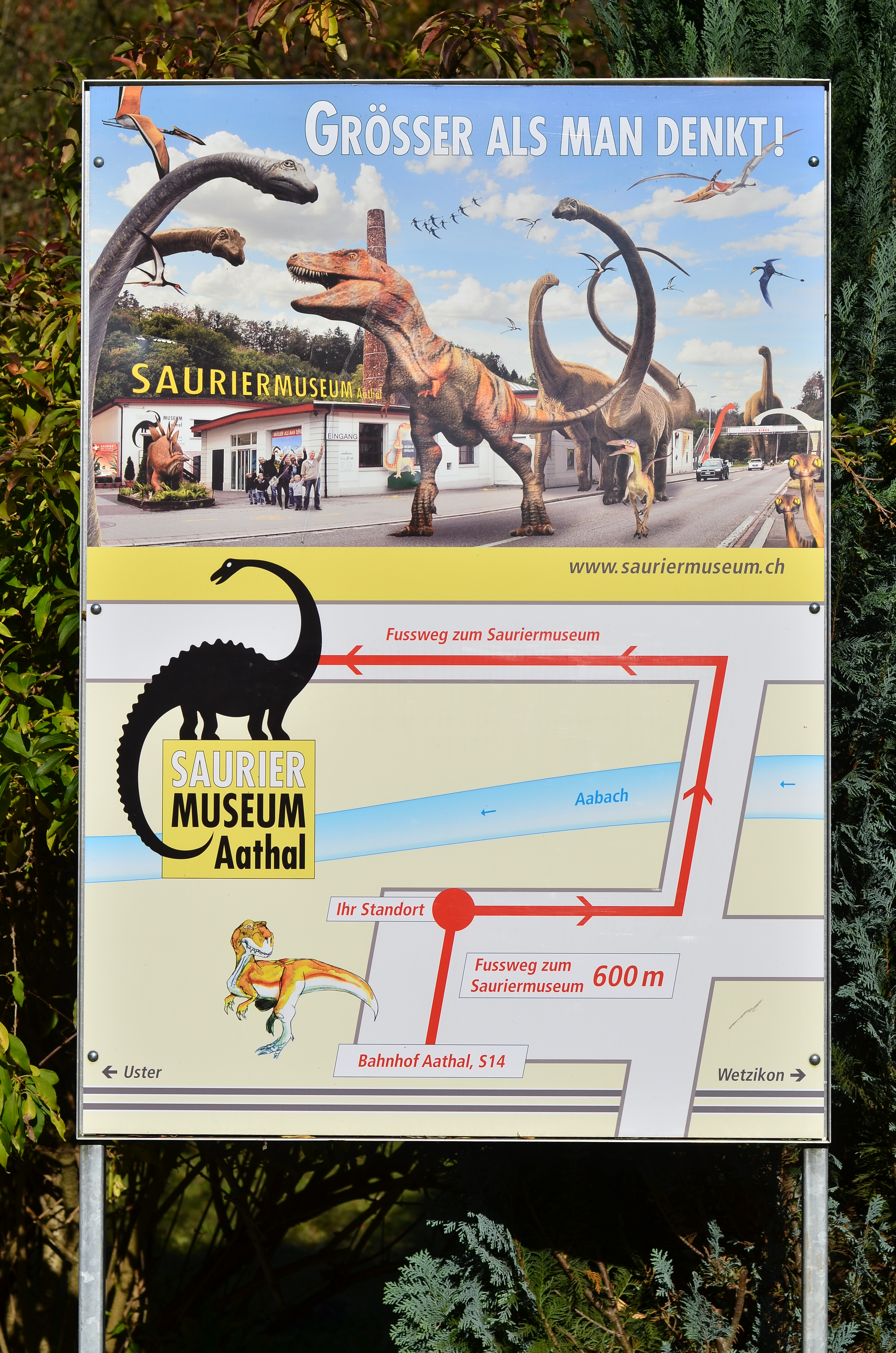 Sauriermuseum Aathal, Zürichstrasse / Unter Aathal 202 in Aathal-Seegräben (Switzerland)